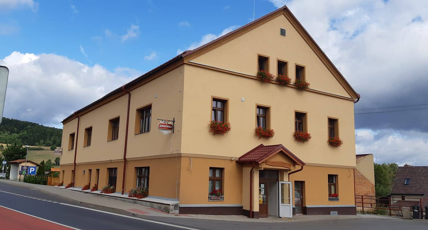 Motorest v Huntířově u Děčína. Budova patří pod správu obce. Od roku 2017 prošla kompletní rekonstrukcí. V současné době je zde obchod, restaurace, společenský sál a bytová jednotka o velikosti 4+kk.